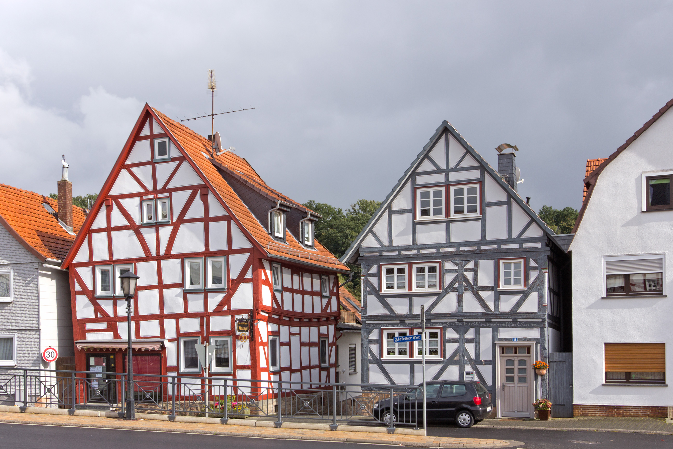 Fachwerkhäuser gegenüber dem Rathaus in Kirtorf im Vogelsberg;links Alsfelder Tor 1, rechts Neustädter Str. 15 (Objektkoordinaten).